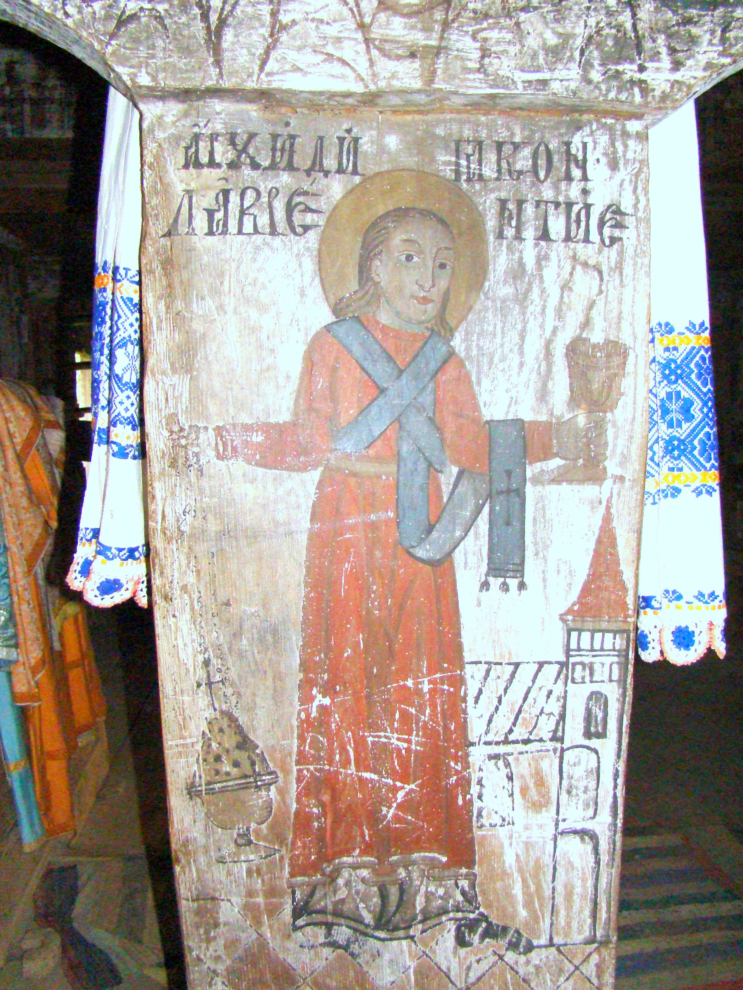 Biserica de lemn „Sf.Dumitru” din Larga, județul Maramureș